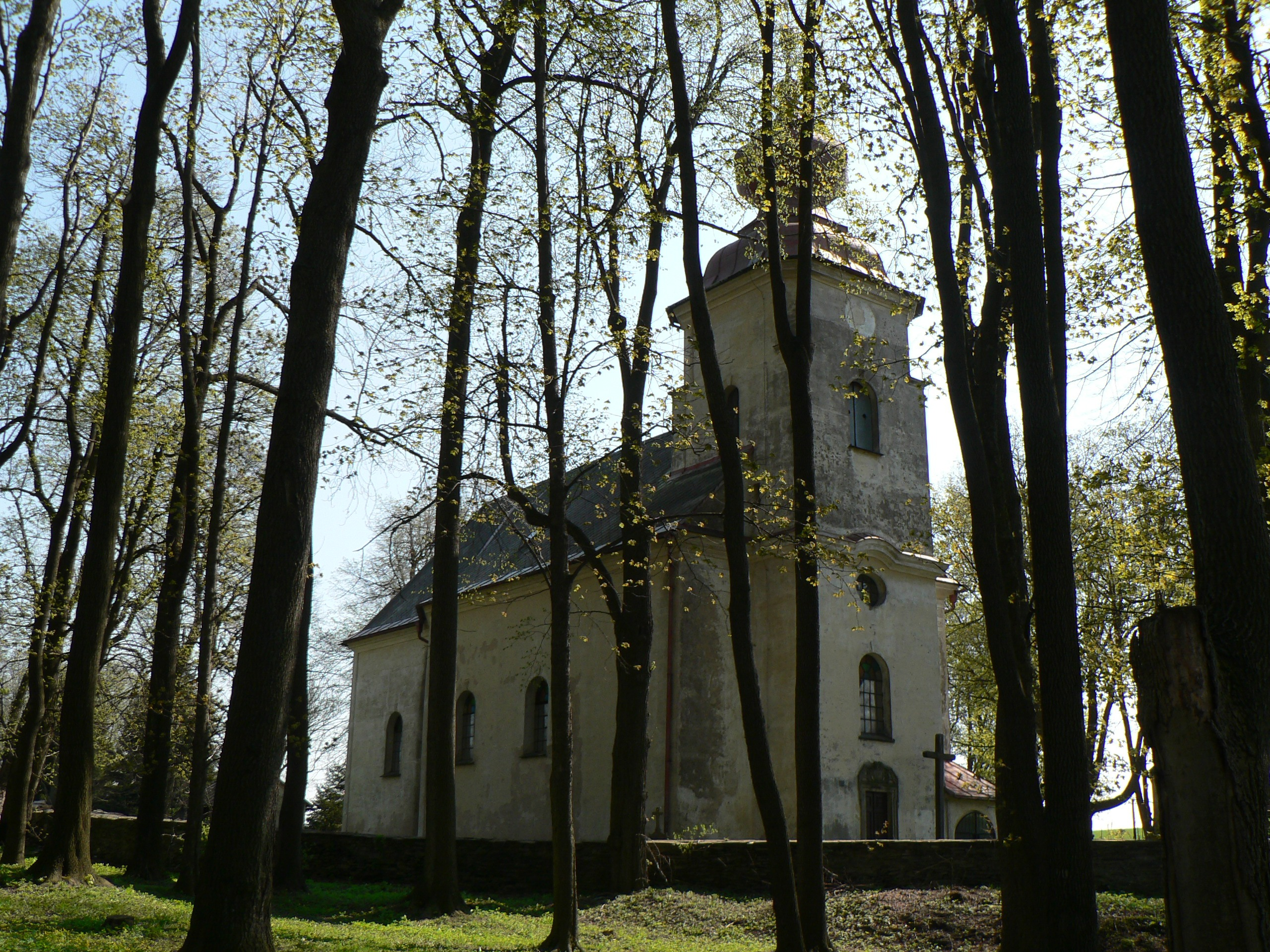 Kostel svaté Kateřiny (Stránské)